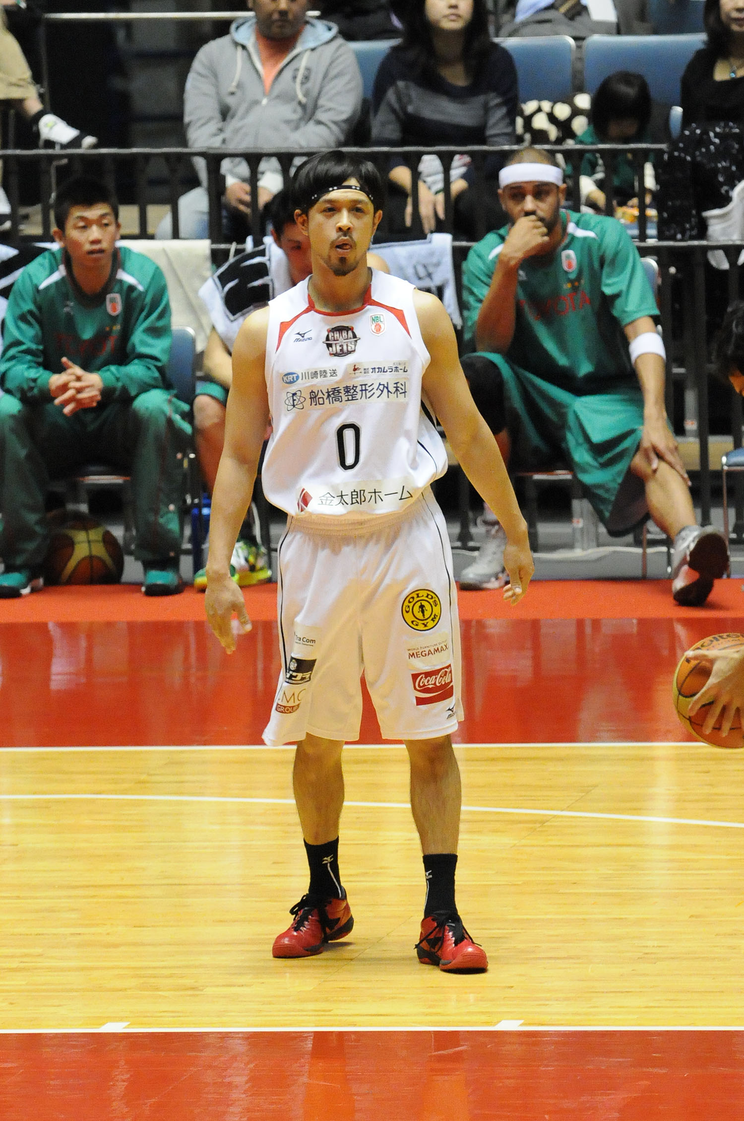 千葉ジェッツ、佐藤博紀選手。代々木第一体育館で。